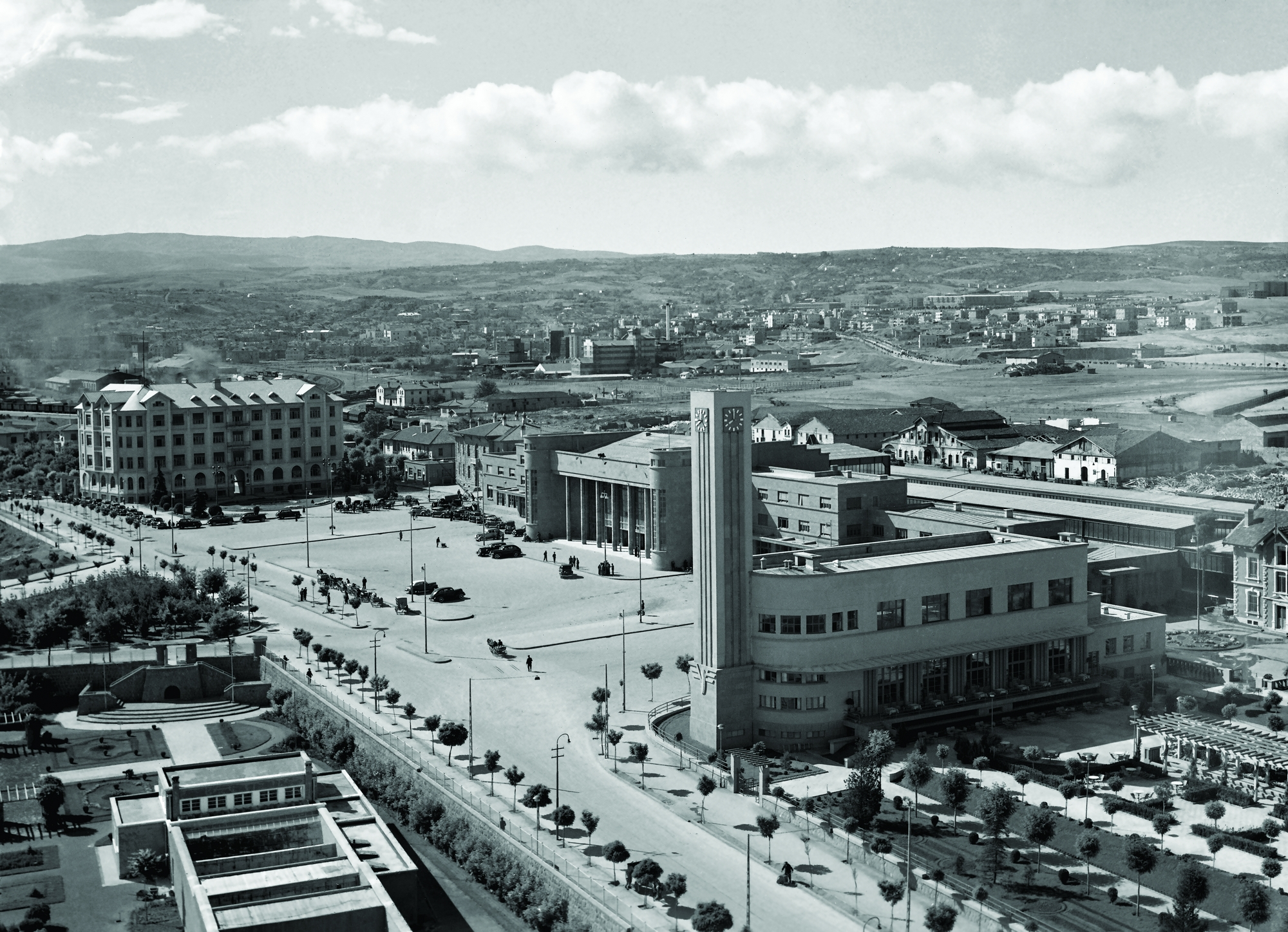 The railway line between İzmit-Ankara started operating on 27 November, 1892. The first railway station was a small and modest structure and it was inaugurated with a ceremony. The residents of Ankara flooded in the railway station to participate in the ceremony and to see the very first train which came to the city. A new railway station was decided to be constructed in 1934. Sabri Şekip Akalın, a 25-year old architect working for the Ministry of Transport, was assigned for the construction works. The new railway station, the construction of which started on November 3, 1935 was completed on September 2, 1937 and put into service on September 30, 1937. 19 Mayıs Meydanı, Ankara Garı, Gar Gazinosu, Devlet Demiryolları Umum Müdürlüğü Binası, 1940’lı Yıllar İzmit-Ankara demiryolu hattı 27 Kasım 1892 günü işletmeye açıldı. Açılışı törenle oldu. O gün orkestra bile vardı. Ankaralılar istasyona dökülmüş, hem töreni hem de sonunda kente gelen ilk treni ilgiyle izlemişlerdi. İlk gar binası, mütevazı, iddiasız, küçük bir yapıydı. Kırk yıl kadar zamana göğüs gerdi. 1934 yılıydı, yeni bir gar binası yapılmasına karar verildi. Yapımı için Ulaştırma Bakanlığı’nın 25 yaşındaki mimarı Sabri Şekip Akalın görevlendirildi. 3 Kasım 1935 günü temeli atılan gar binası inşaatı 1937’nin 2 Eylül günü tamamlandı. 30 Ekimde hizmete girdi. Ertuğrul Şevket’in iki yıl sonraki yazısının başlığına bakılırsa, “Avrupanın En Modern İstasyonu Ankara Garı”ydı: “Türkiyenin kalbi güzel Ankaranın yeni garı, bu kalbin atışını tanzim eden, kanlarını etrafa dağıtan canlı bir uzuv gibidir. Ankaraya ayak basanın karşısına yapısının sağlamlığı, güzelliği ve temizliği ile yeni Türkiyenin timsali gibi çıkan gar, yolcunun gözlerini dinlendiren, muhayyelesini şehirde göreceği harikalara hazırlıyan bir manzara teşkil eder.”